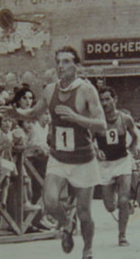 Il maratoneta italiano Artidoro Berti all'età di 16 anni.